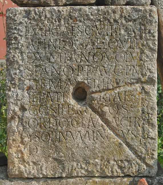 Forrás: Ubi erat Lupa 10937. Szabadon használható (lupa 10937)